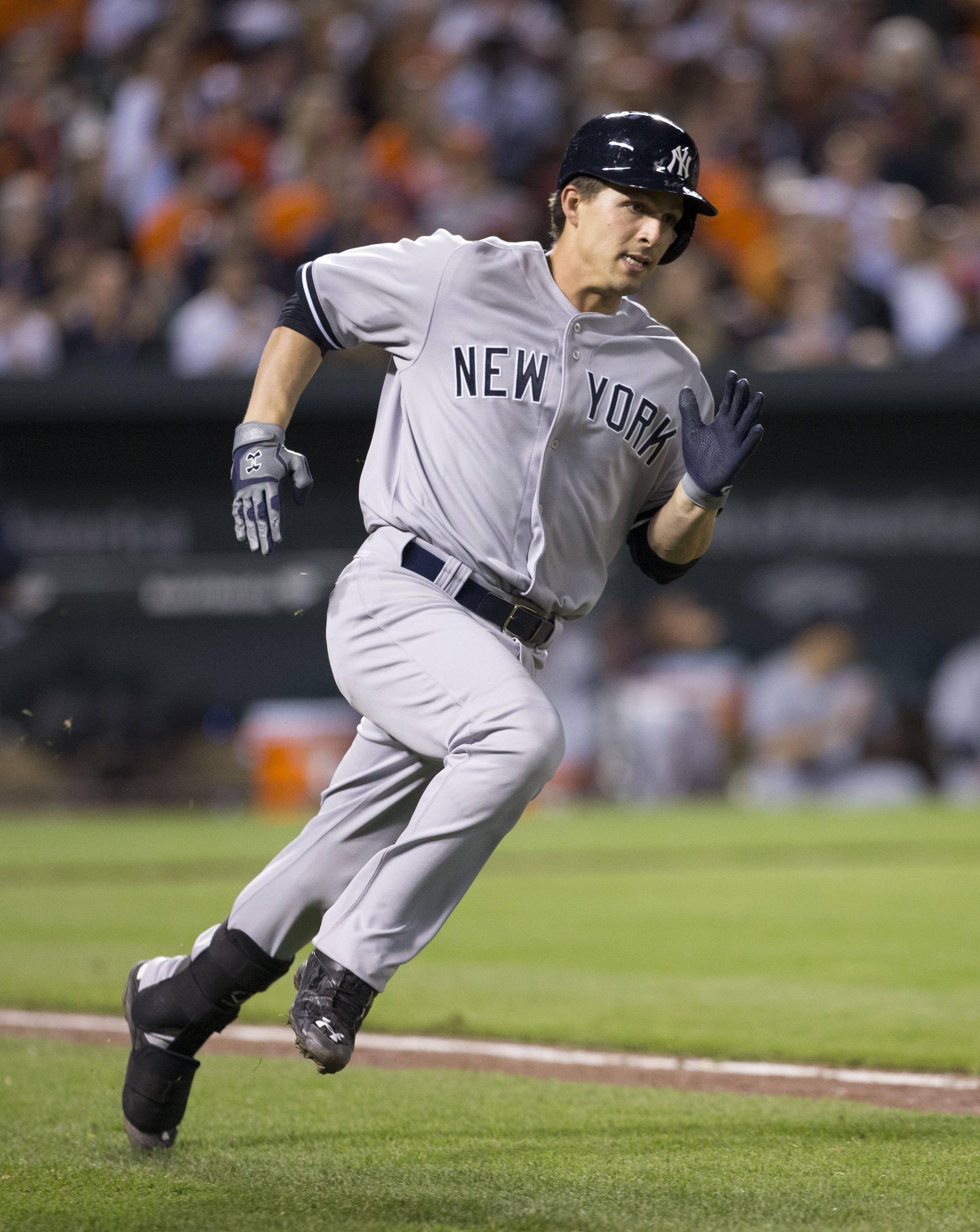 Yankees at Orioles 04/13/15